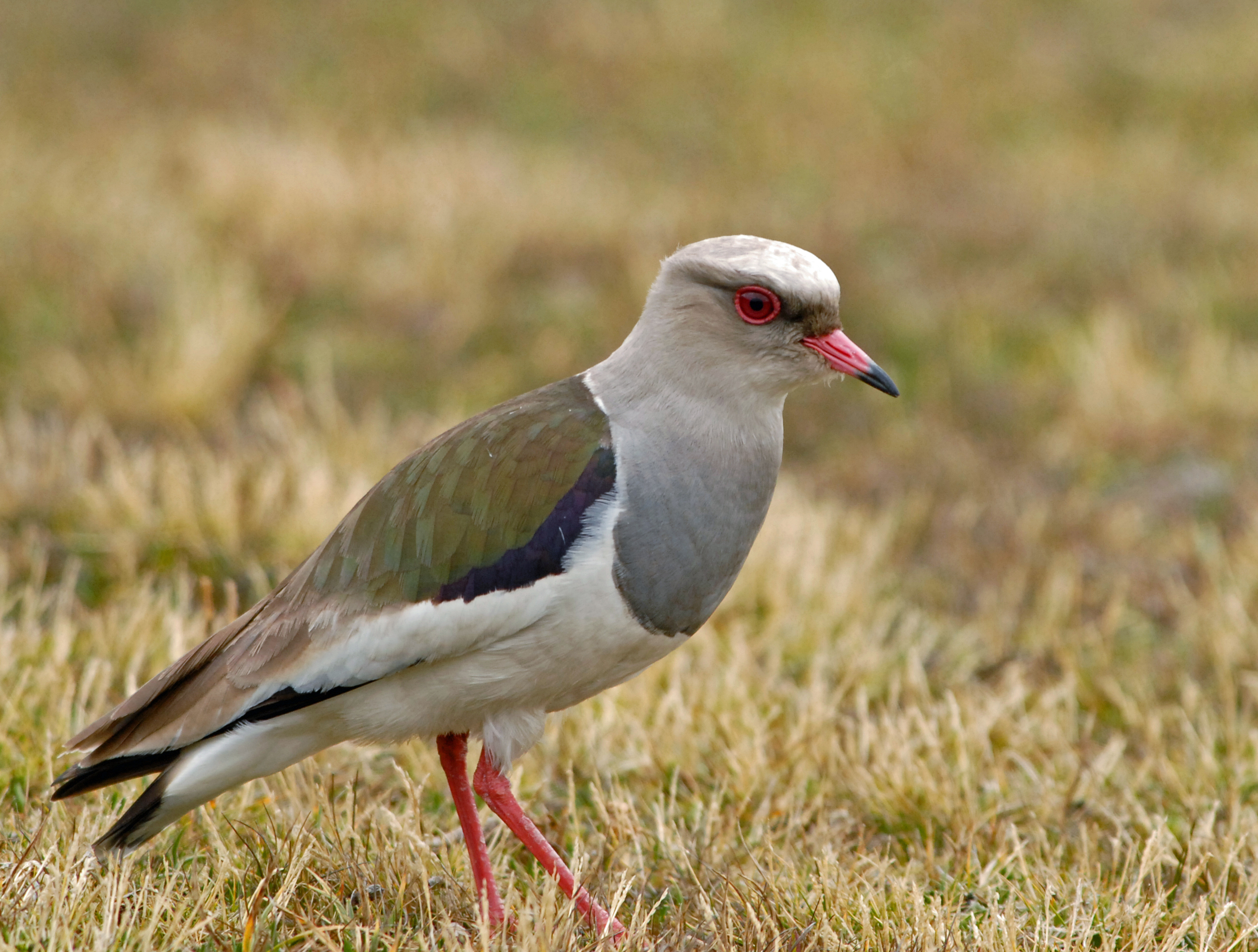 Andean Lapwing (Vanellus resplendens)